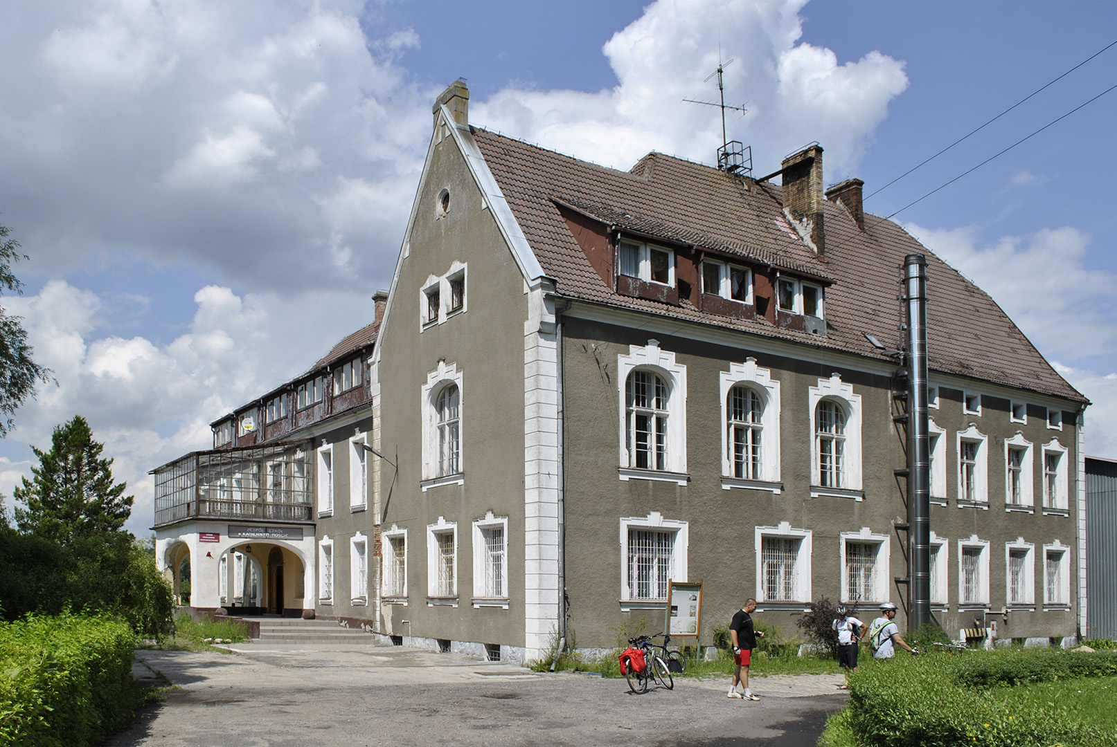 Kamienny Most - pałac